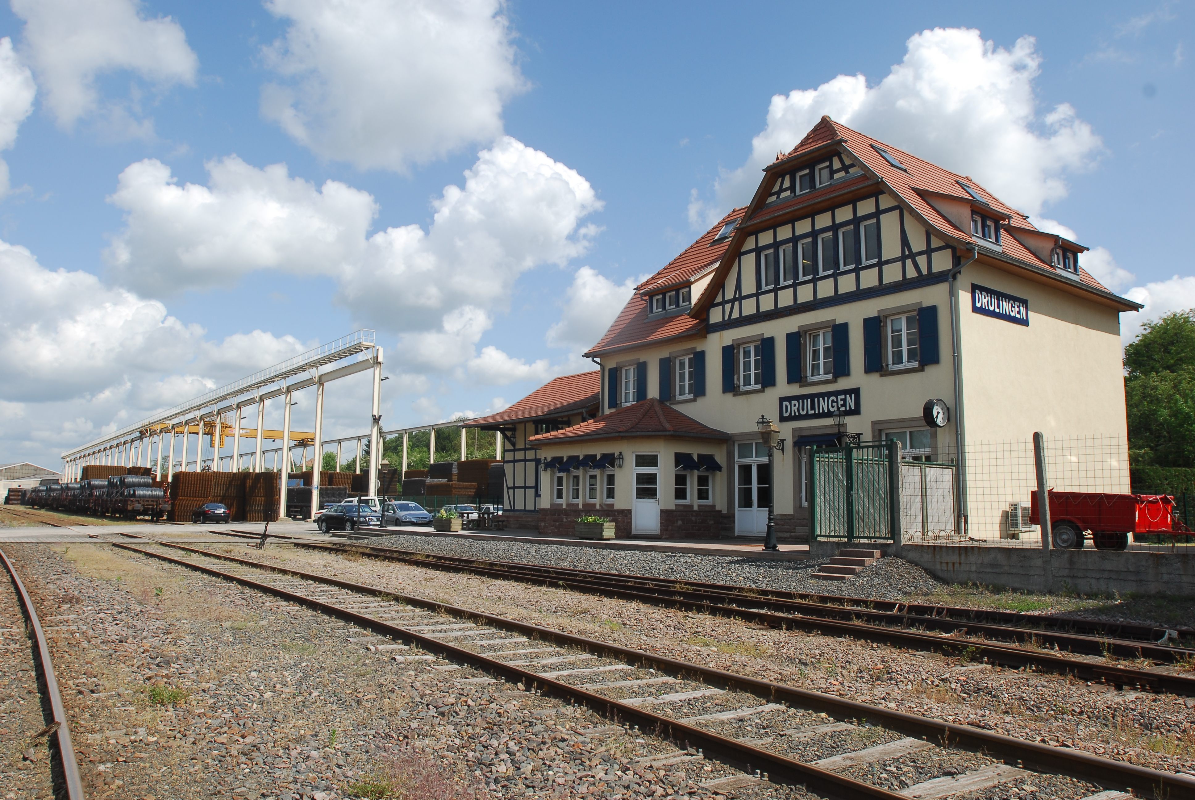 Siège du groupe Sotralentz, ancienne gare de Drulingen